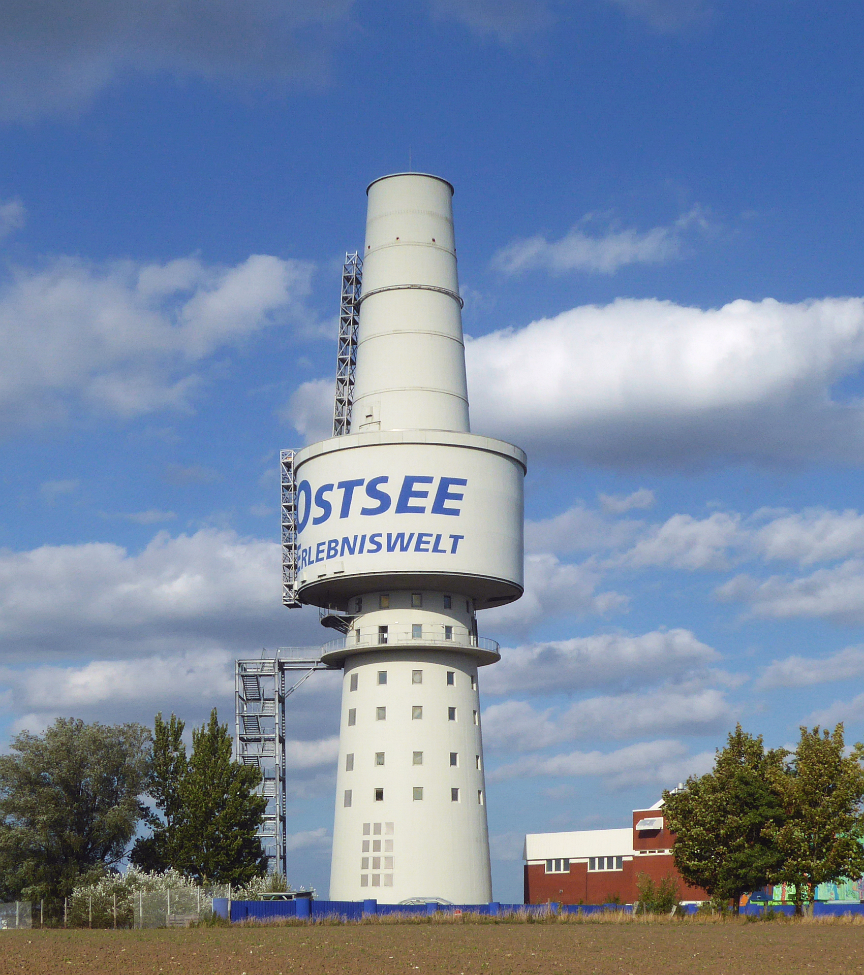 Klaustorf Holstein Ostsee Erlebniswelt nahe Großenbrode Meereszentrum Fehmarn ehemalig BW-Aufklärungsturm - Foto 2018 © Wolfgang Pehlemann P1270478.jpg